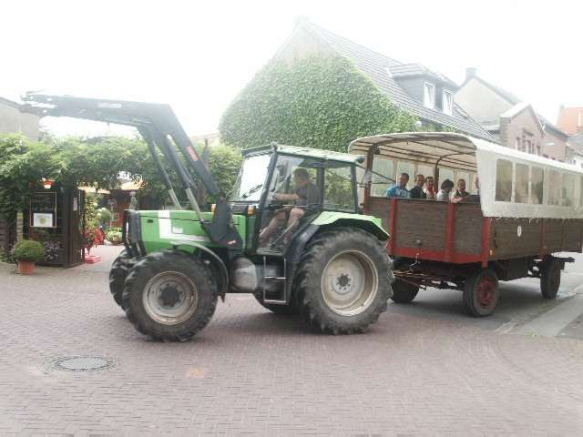 Tractor met 'Jan Plezier' zeilwagen, Xanten, Duitsland